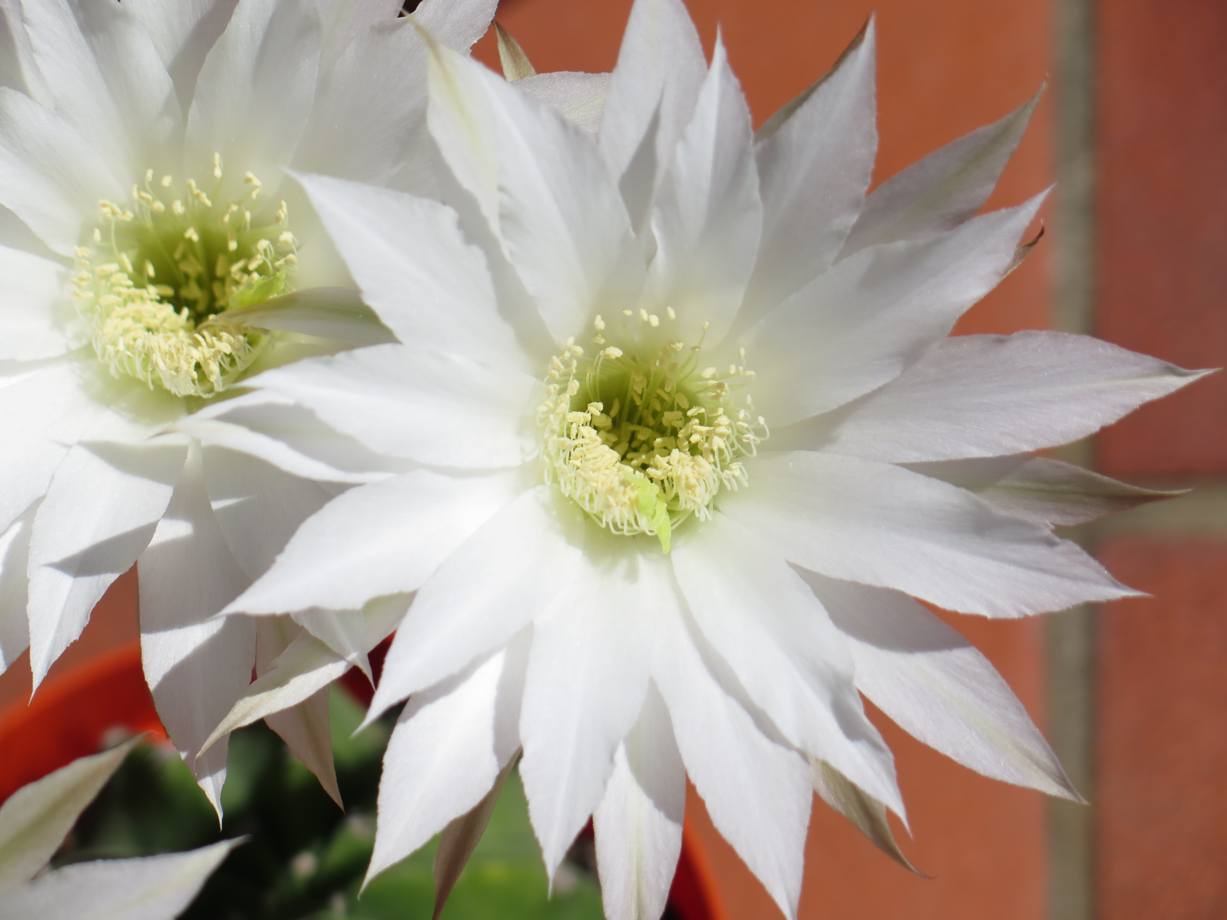 I fiori dell'echinopsis subdenudata